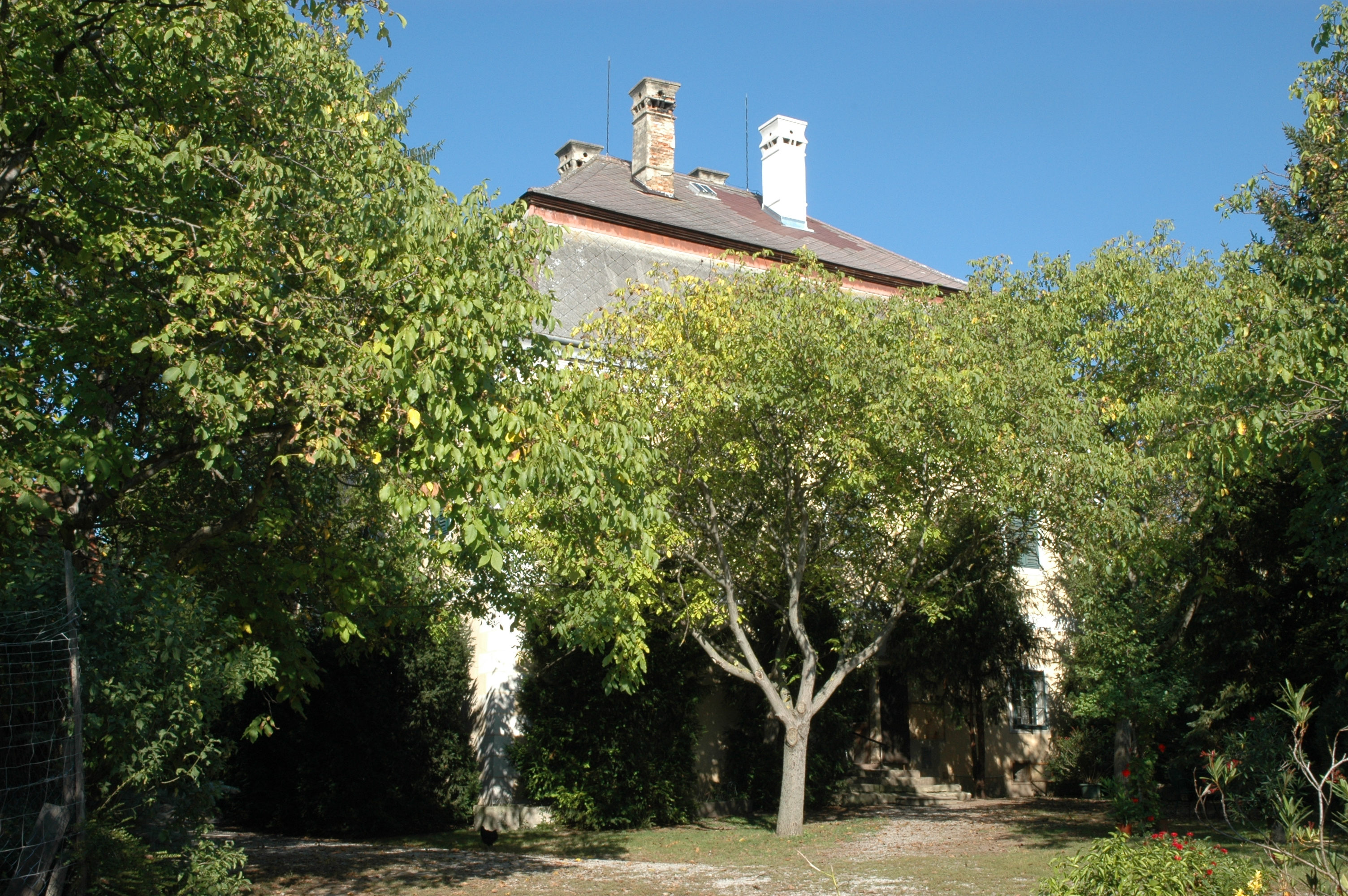 Beethovenhaus, ehem. Trautingerhof, Gneixendorf, Krems an der Donau